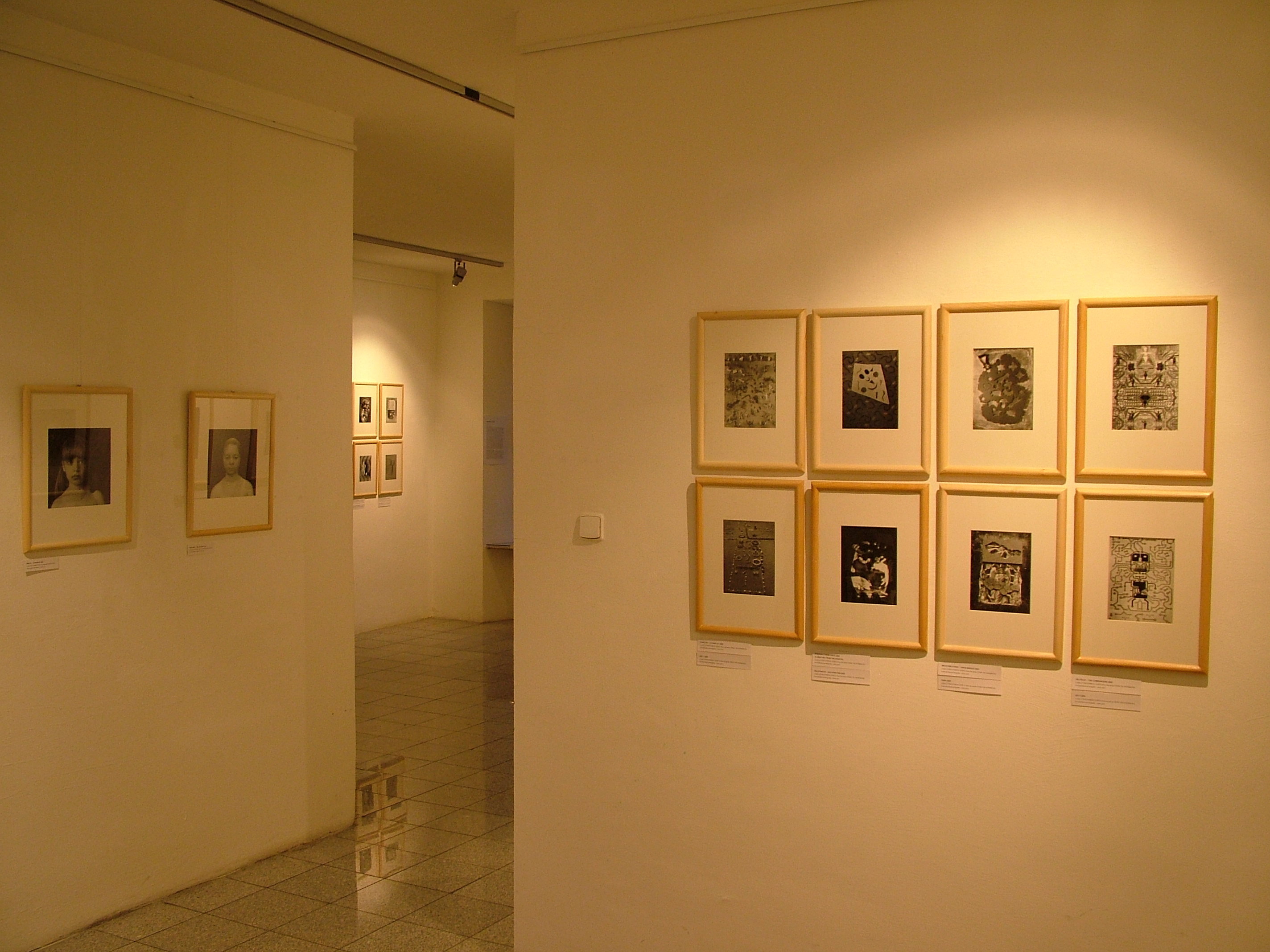 Výstava fotografií, Středoevropský dům fotografie (Stredoeurópsky dom fotografie), listopad - prosinec 2011